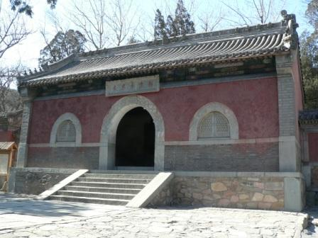 八大处香界寺门